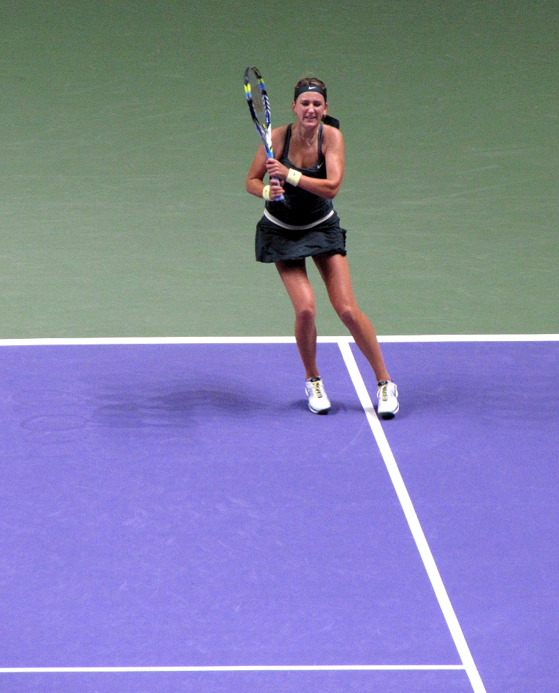 Azarenka podczas Mistrzostw WTA - Stambuł 2012